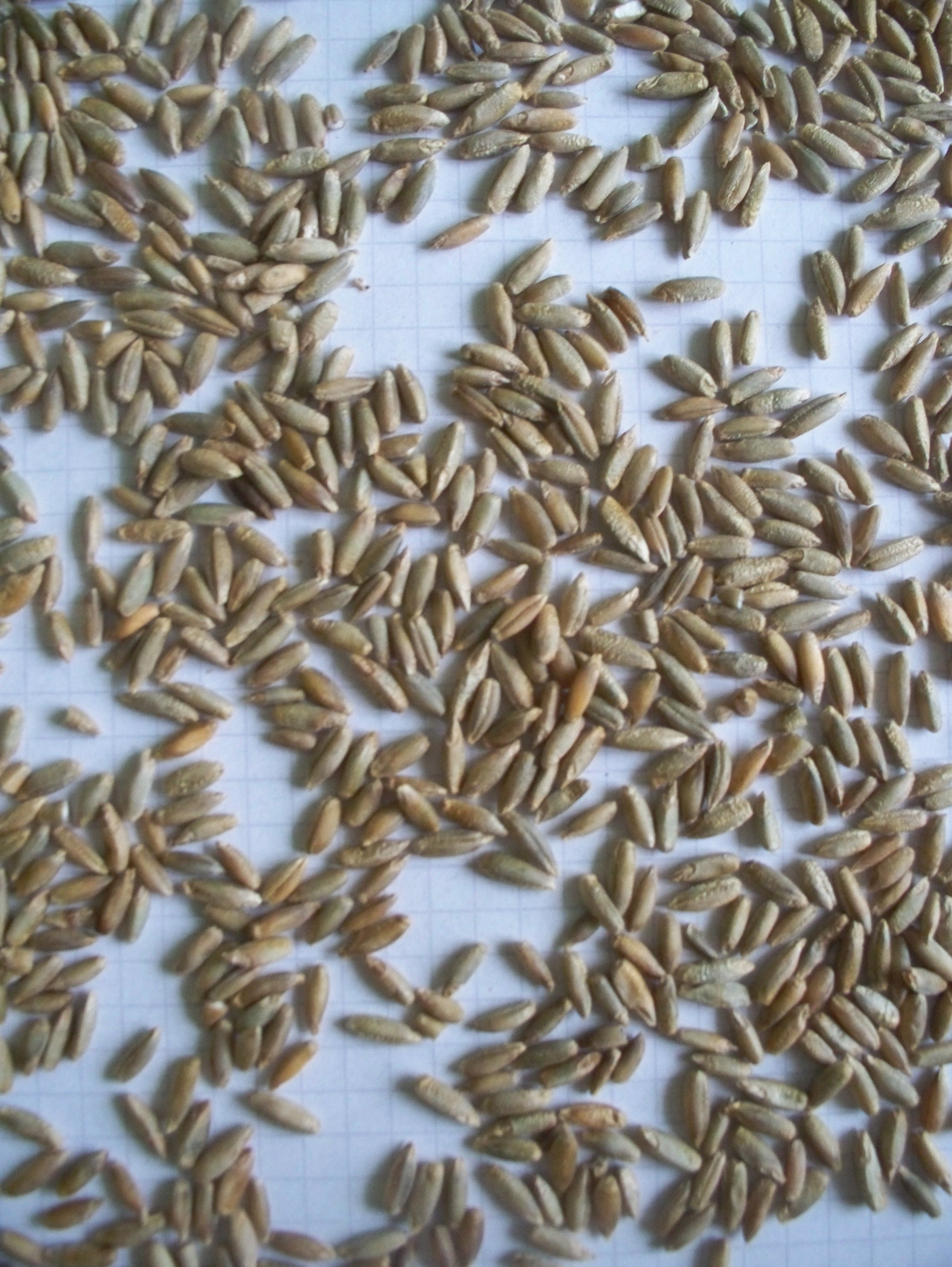 ziarniaki żyta